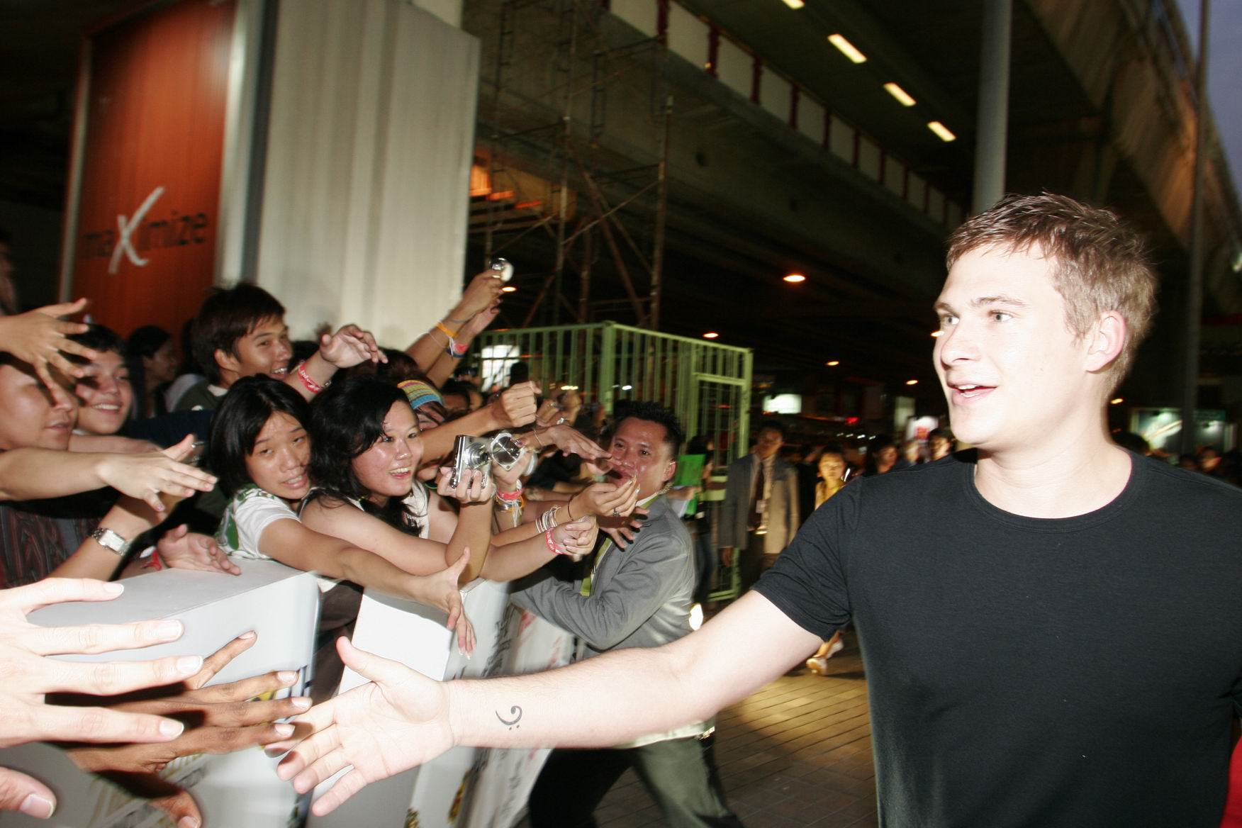 Lee Ryan at MTV Asia Awards 2006, Bangkok,Thailand